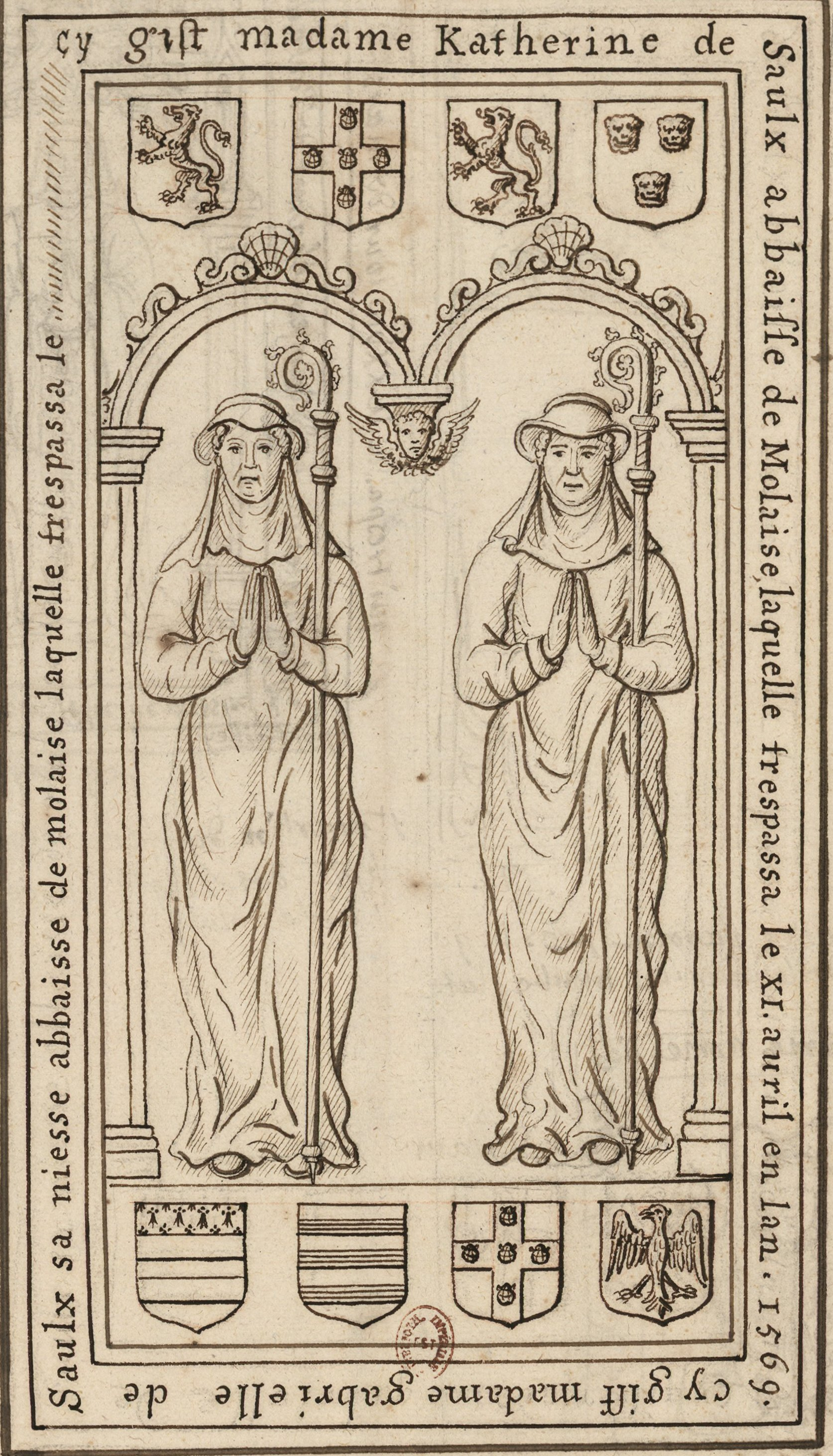 Pierre tombale sur laquelle sont gravées les effigies de deux abbesses